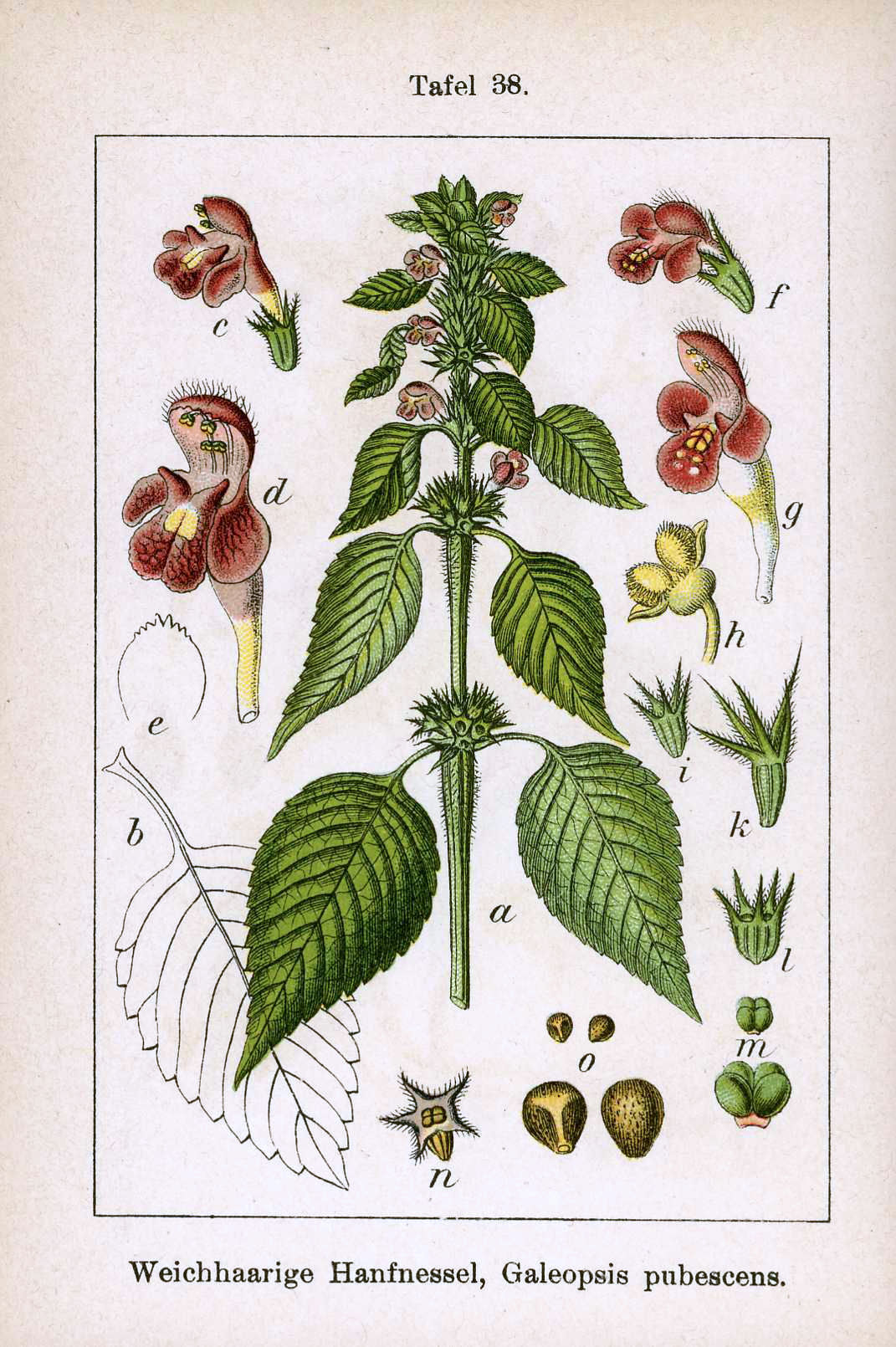 Galeopsis pubescens Besser Original Caption Weichhaarige Hanfnessel, Galeopsis pubescens